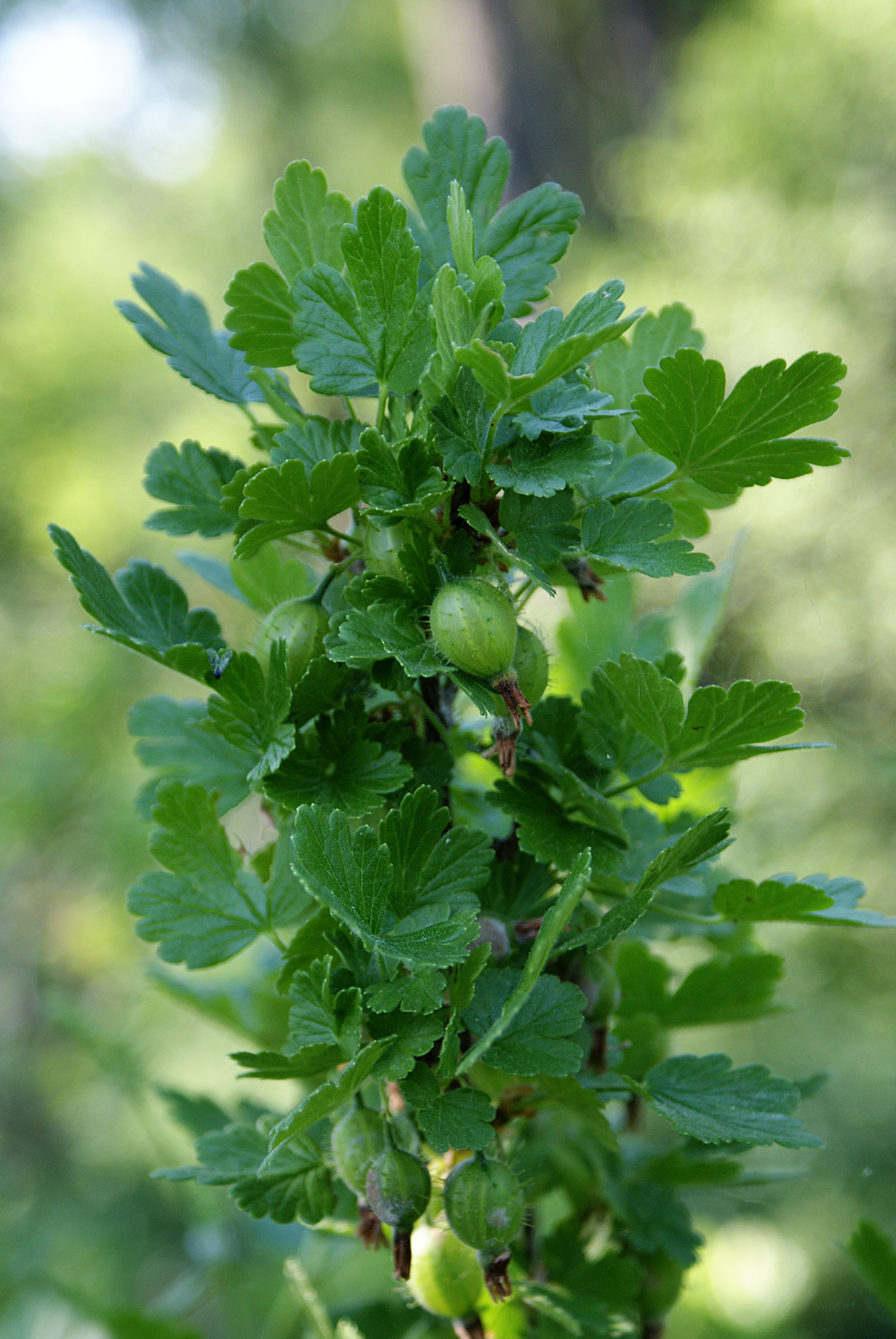 Krusbär This file was made possible through a cooperation with the Cloudberry project.